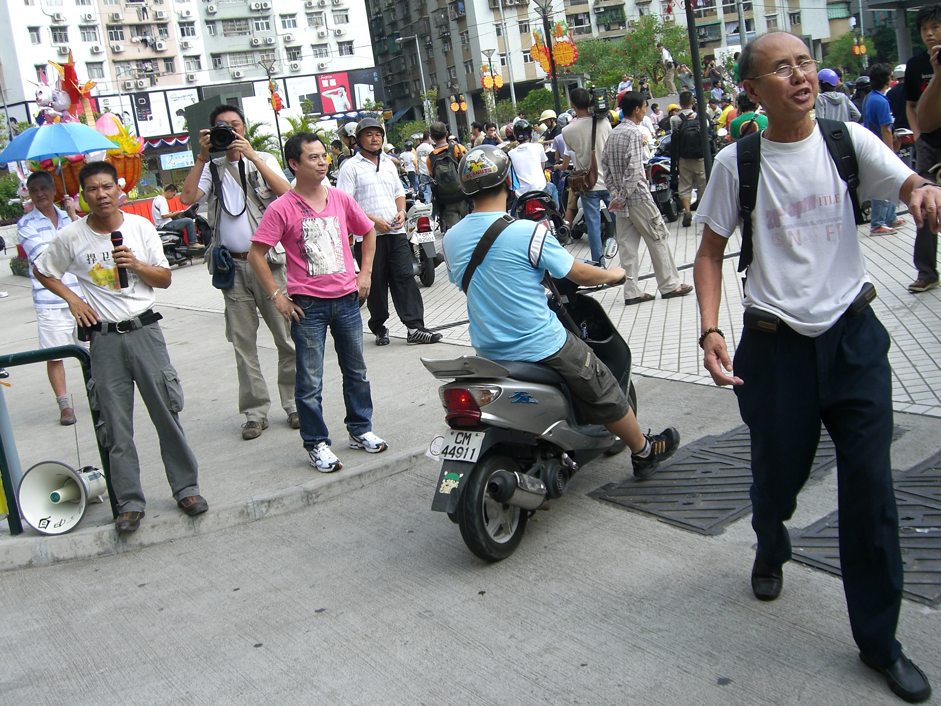 Macau 9.30 Parade